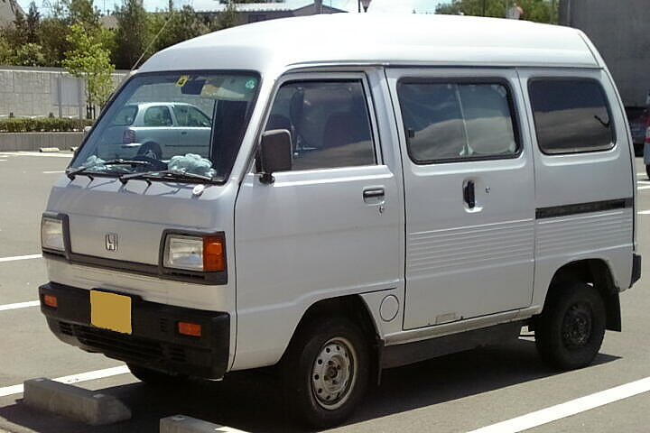 ホンダ・ストリート